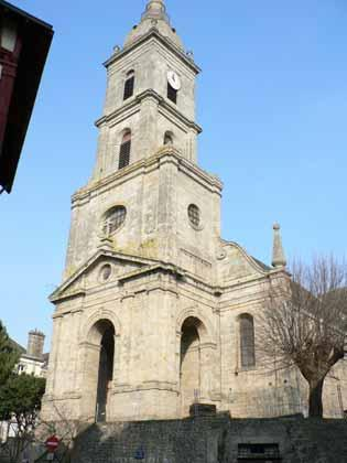 eglise